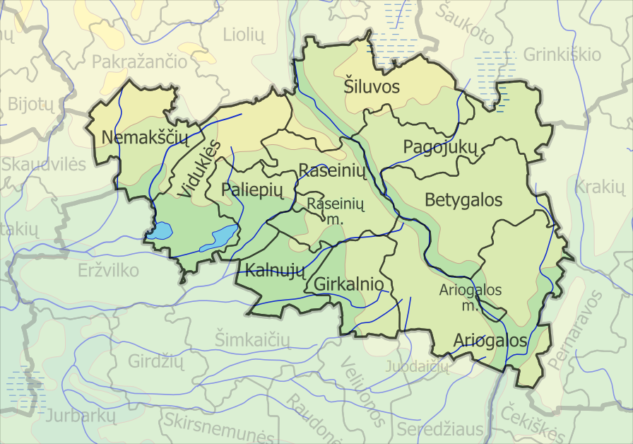 Padaryta iš :image:LietuvosSeniunijos.png